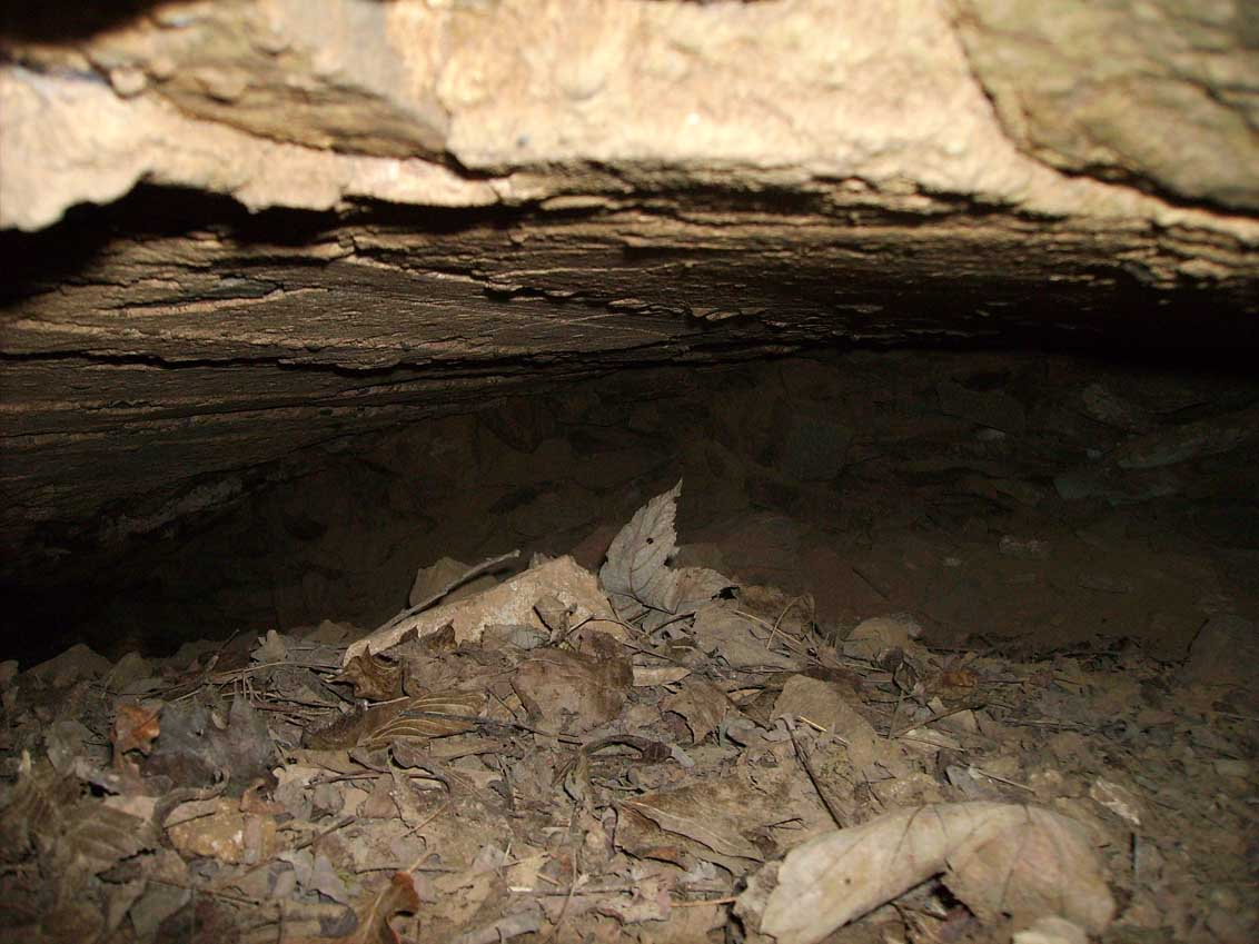 Hohlraum am zerstörten Fort Rheineck.